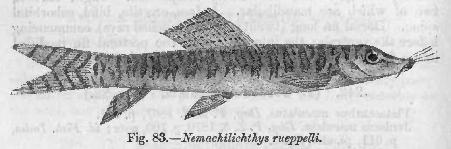 Nemacheilichthys rueppelli = Nemacheilus rueppelli (Sykes, 1839)